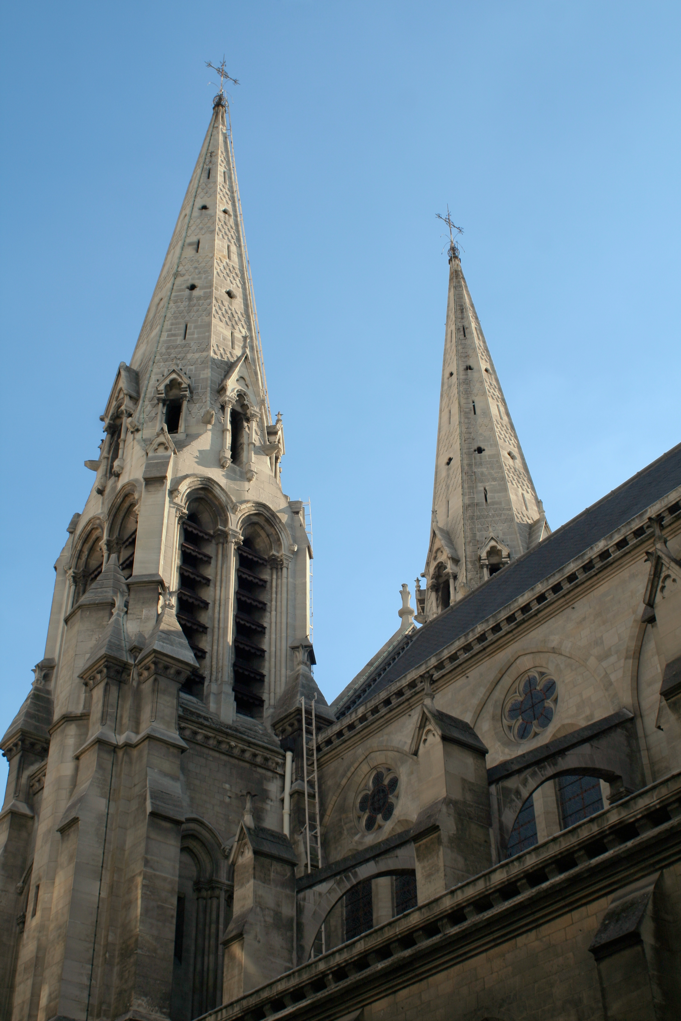 Église Saint-Jean-Baptiste de Belleville, Paris 19e arrondissement. Vue des flèches depuis la rue de Palestine.